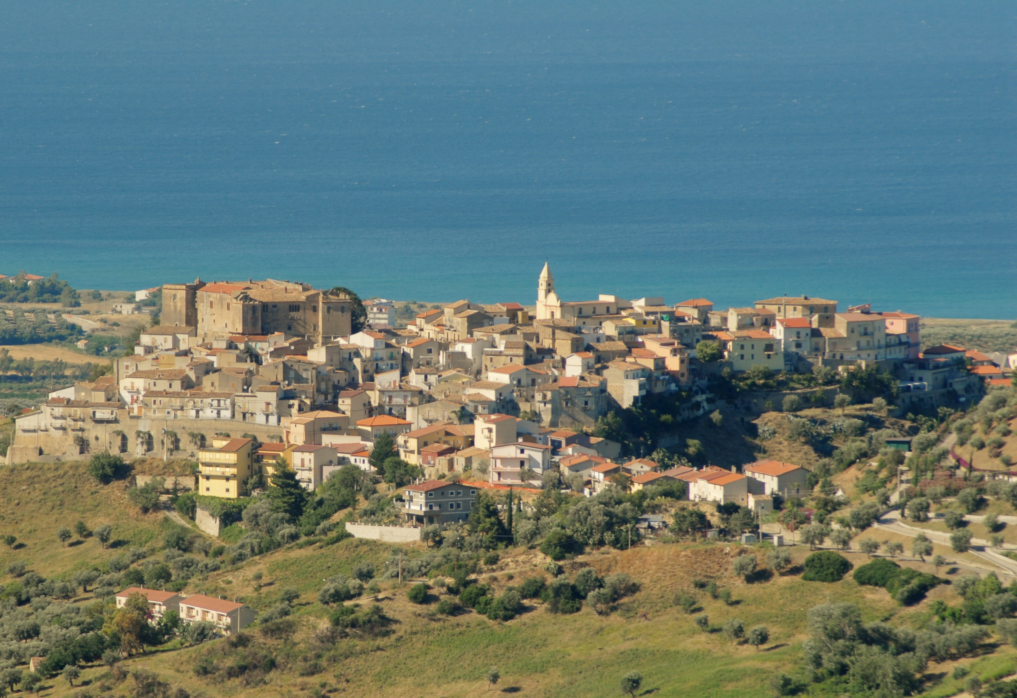 vista di calopezzati